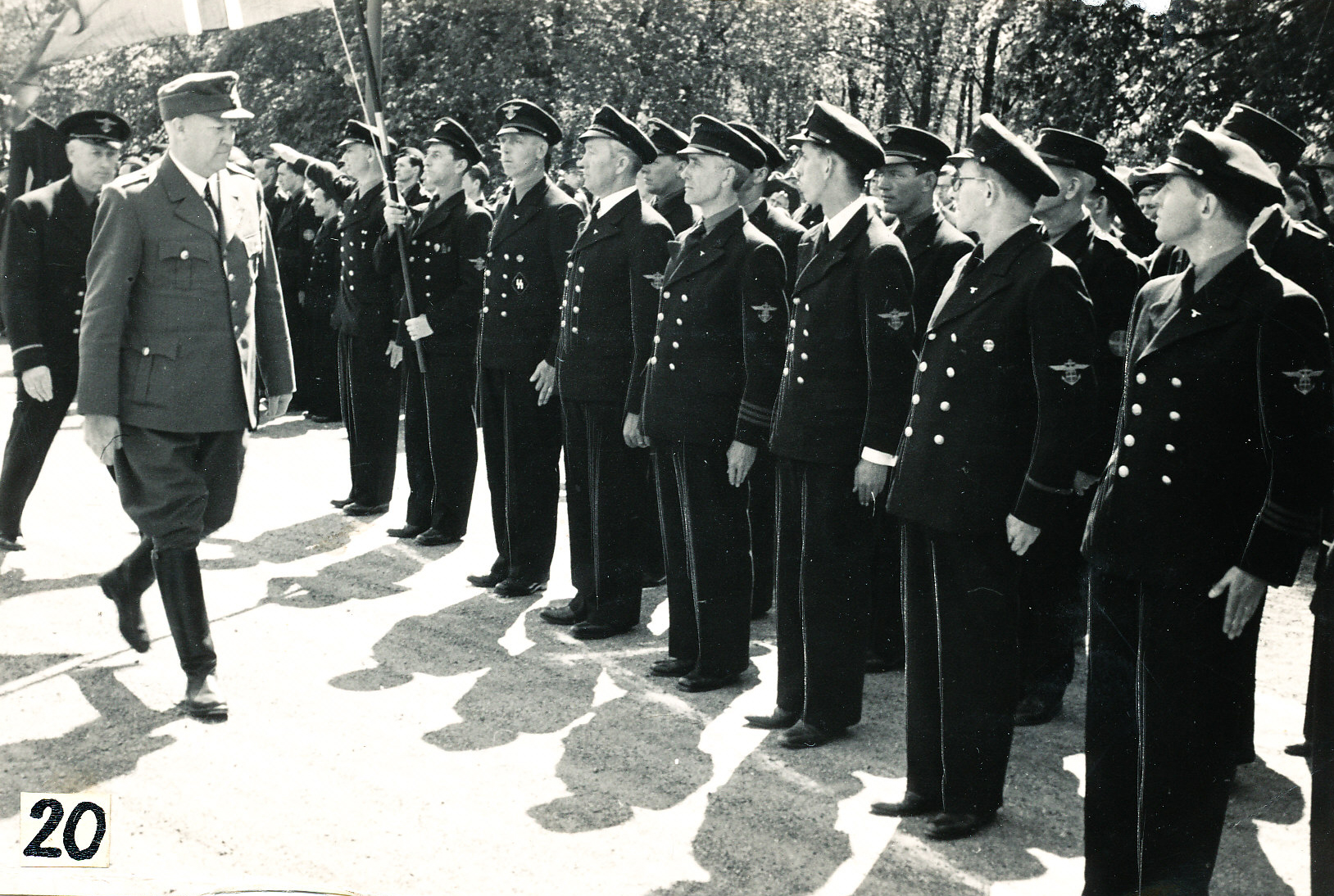 «Føreren under folkemøtet 2. pinsedag» er riktigere beskrivelse, jamfør Borrestevnet, 1943. (8617784591).jpg Fotograf: Hirdmannen. Bildet er fra Nasjonal Samlings 8. stevne i nasjonalparken ved kongegravene i Borre utenfor Horten i Vestfold, omtalt som pinse- eller Borrestevnet, i pinsehelga 1943. Arrangementet begynte lørdag 12. juni og varte til 2. pinsedag, mandag 14. juni. Ifølge NTBs reportasje i Aftenposten dagen etter ankom Quisling med følge leiren i bil på formidddagen den siste stevnedagen. Han ble møtt av mange heil og sæl-rop. Etter en enkel middag inspiserte Quisling området sammen med leirlederen, NS' fylkesfører Thore Tjersland. Klokka 14.00 begynte det som ble beskrevet som stevnets høydepunkt. Da var det parade og defilering for føreren ved Borre kirke. Oppmarsjen ble etterfulgt av et folkemøte i parken klokka 14.30 med tale av ministerpresidenten. Både fylkespropagandaleder Bjarne Steff og NS’ fylkesfører i Vest-Viken Fylkesorganisasjon ønsket velkommen før hovedtalen. I Filmavisen 28. juni 1943 er det en propagandareportasje fra stevnet, og i Egil Christophersens Vestfold i krig side 160 skriver forfatteren mer om Borreparkens rolle som NS' viktigste mønstringsplass. Nasjonal Samling, forkortet NS, var et norsk politisk parti som ble grunnlagt av Vidkun Quisling i 1933 og ble oppløst ved frigjøringa i 1945. Partiet la seg etterhvert nært opp mot nasjonalsosialismens ideologi og ble støtteorganisasjon for den tyske okkupasjonsmakta i Norge under andre verdenskrig. RA/PA-0781/Fc/0004/0513 (1173)